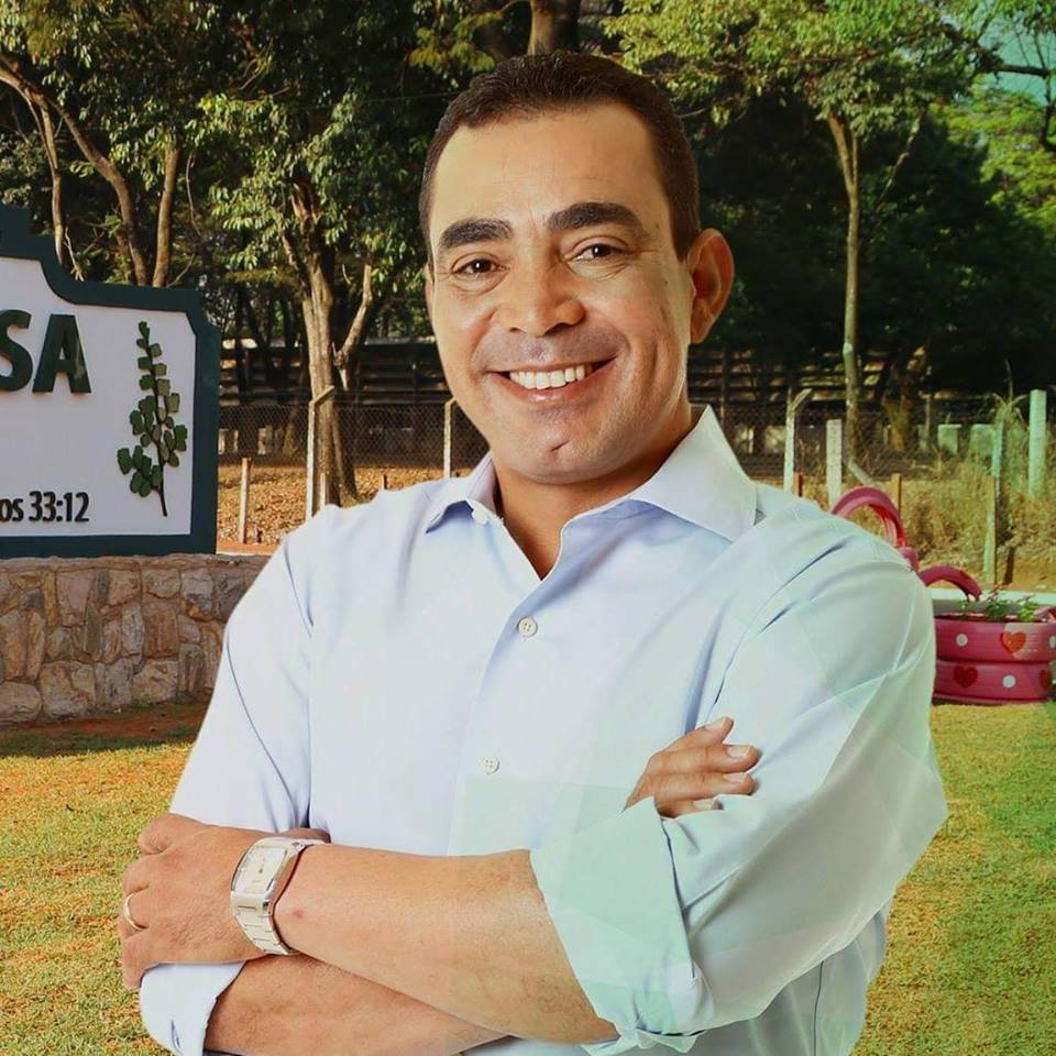 Benjamim Bill Vieira de Souza (Assis Chateaubriand (Paraná), 11 de dezembro de 1972) é Administrador de empresas e político brasileiro, filiado ao Partido da Social Democracia Brasileira (PSDB), sendo o atual prefeito do município de Nova Odessa, no interior do estado de São Paulo.